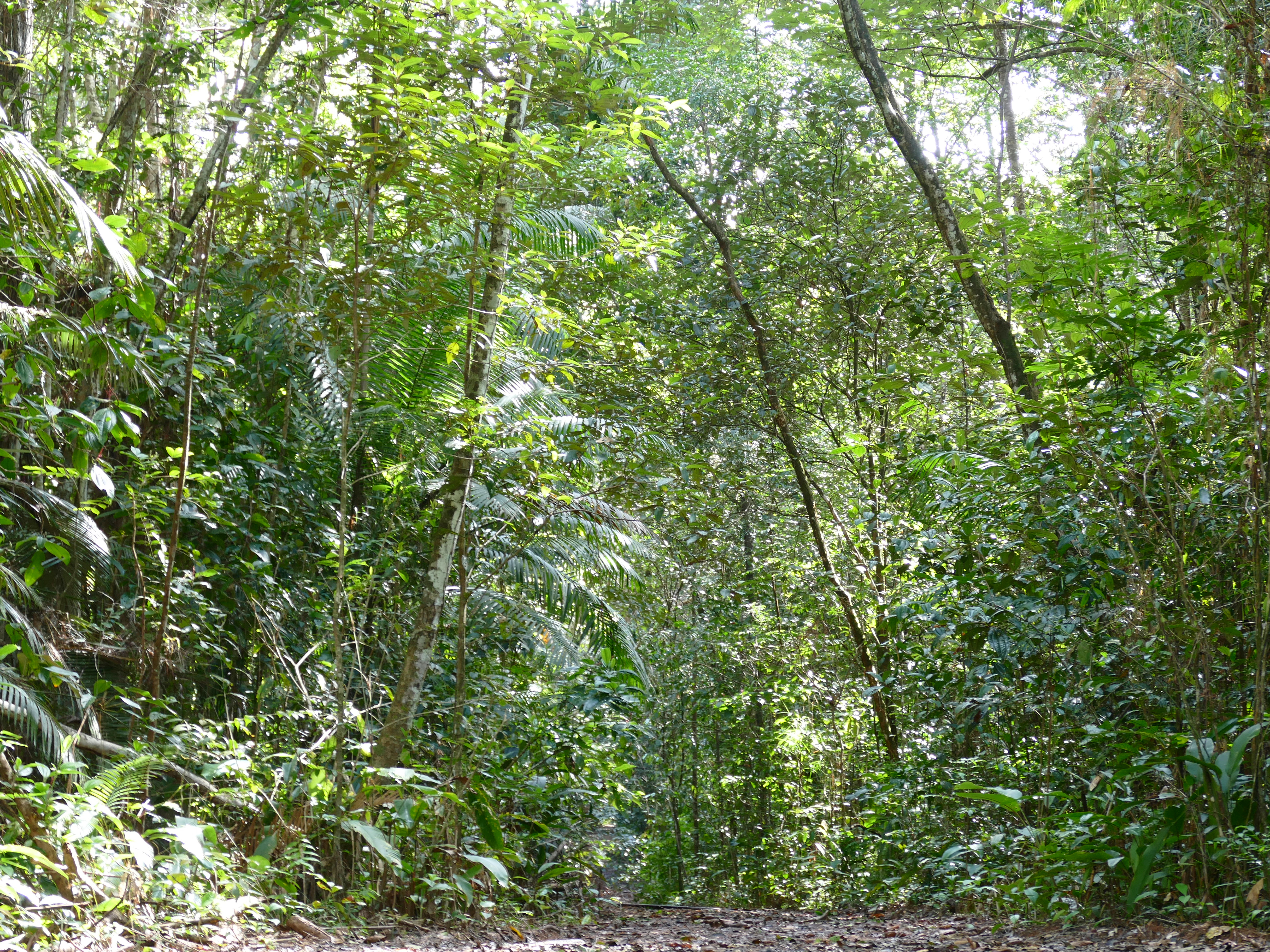 Crique Couleuvre, Les Trois Rois, Macouria, French Guyana, FRANCE